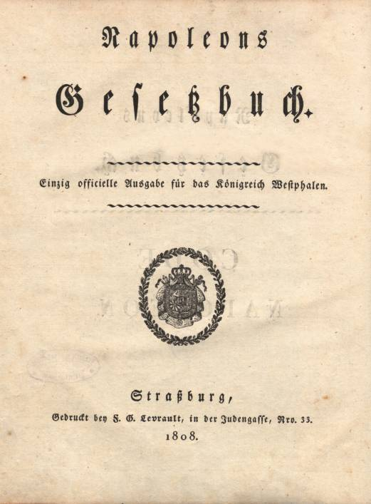 Napoleons Gesetzbuch: Einzig officielle Ausgabe für das Königreich Westphalen